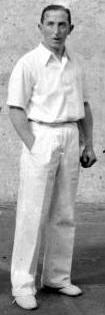 El pelotari Chiquito de Iraeta